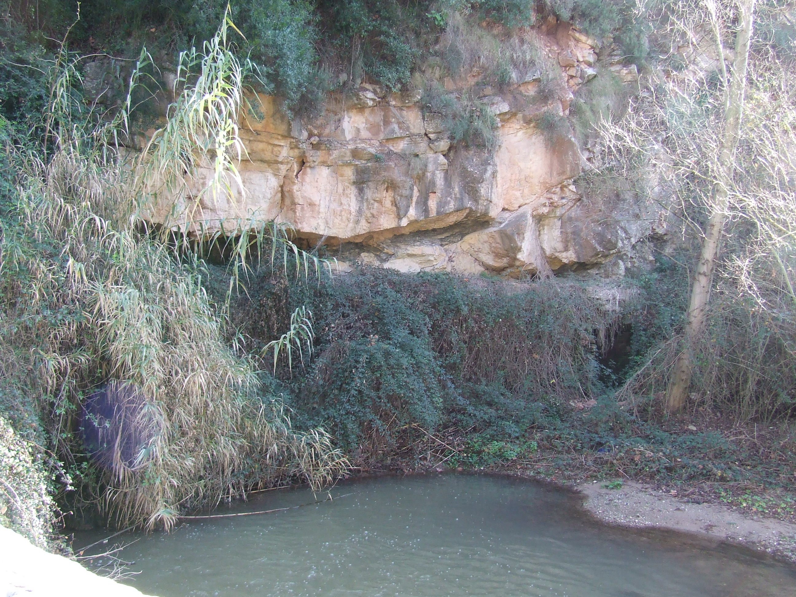 L'Avencó (Bigues, Bigues i Riells, Vallès Oriental)